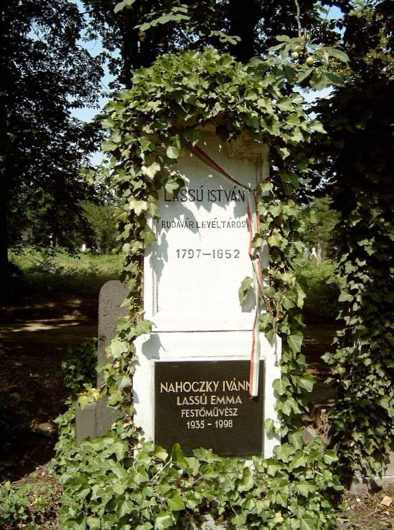 Lassu István (Visk, 1797. ápr. 12. – Pest, 1852. jan. 19.): statisztikai és földrajzi író sírja Budapesten. Kerepesi temető: 17/1-1/a-5.